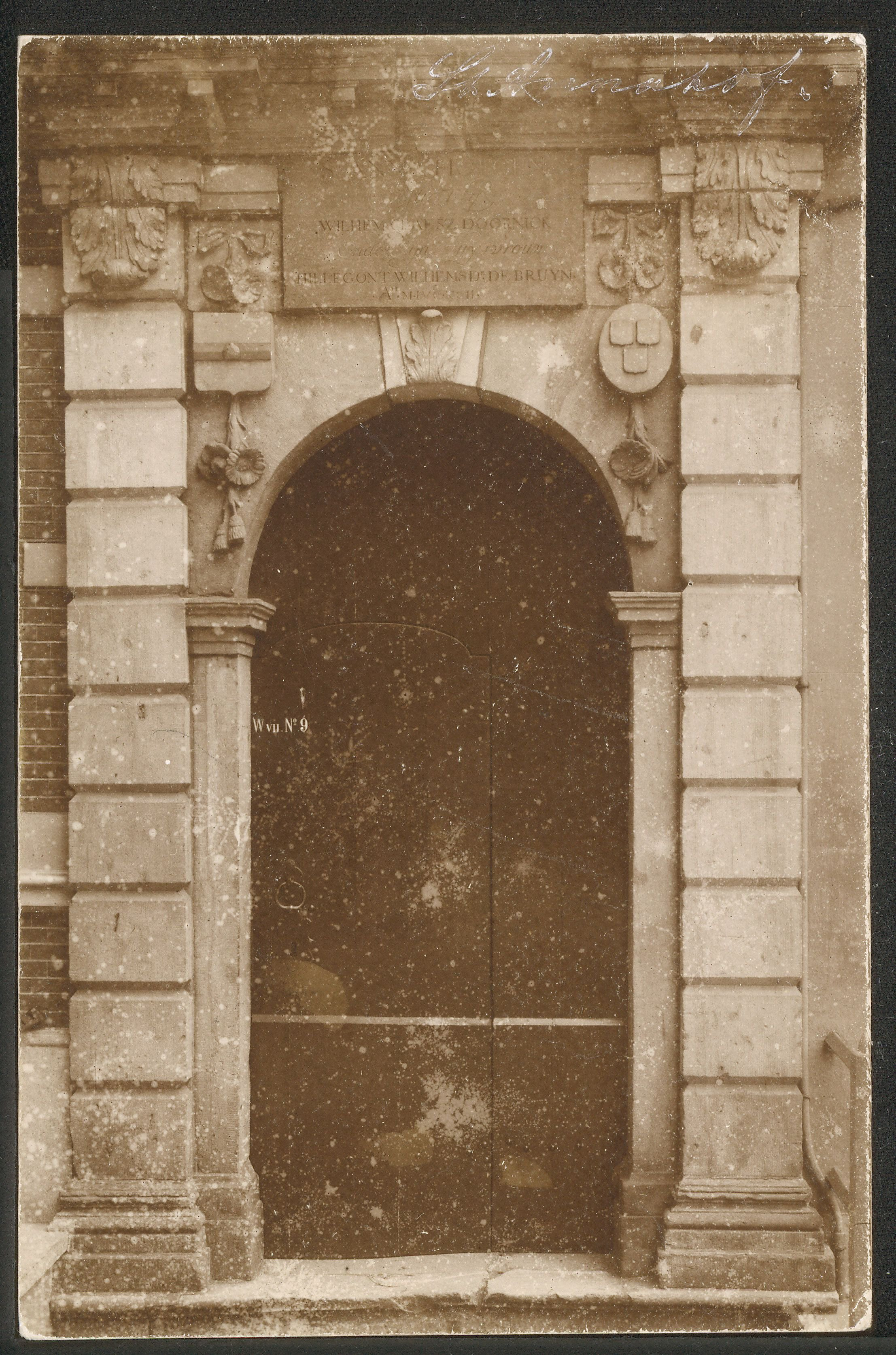 De toegangspoort van het Sint Annahof, Hooigracht 9.